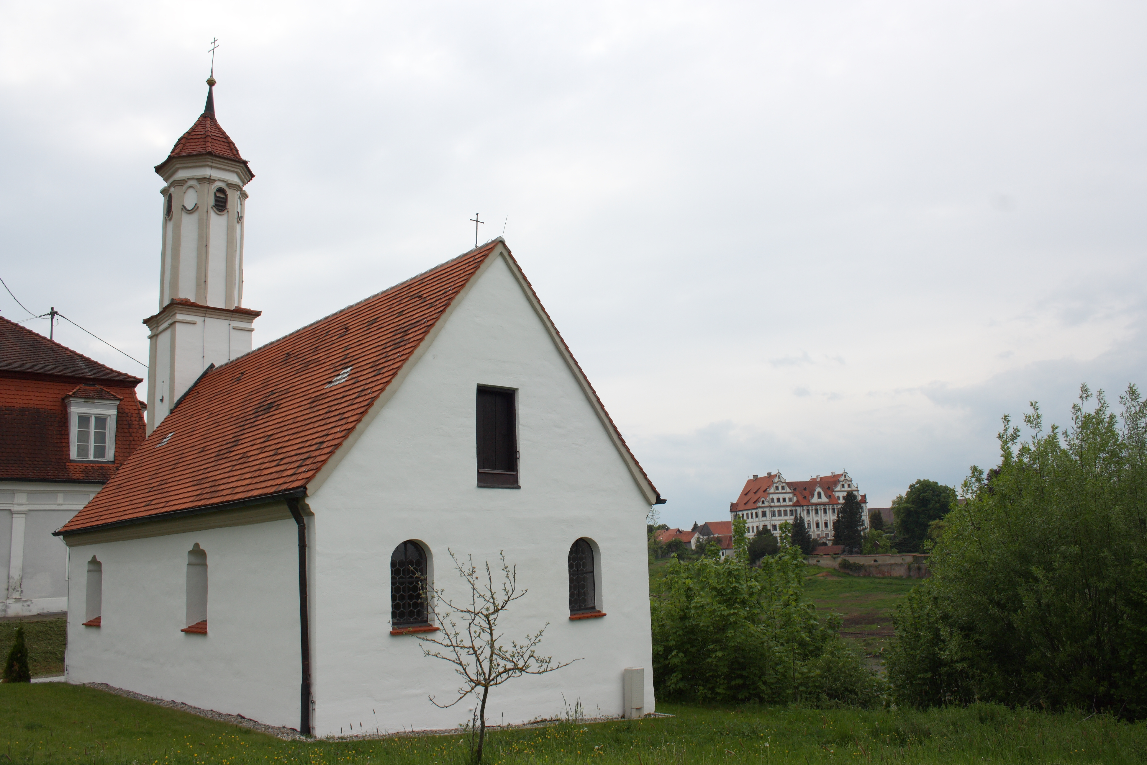 katholische Kapelle St. Alexander in Harthausen, einem Ortsteil von Rettenbach im Landkreis Günzburg (Bayern)